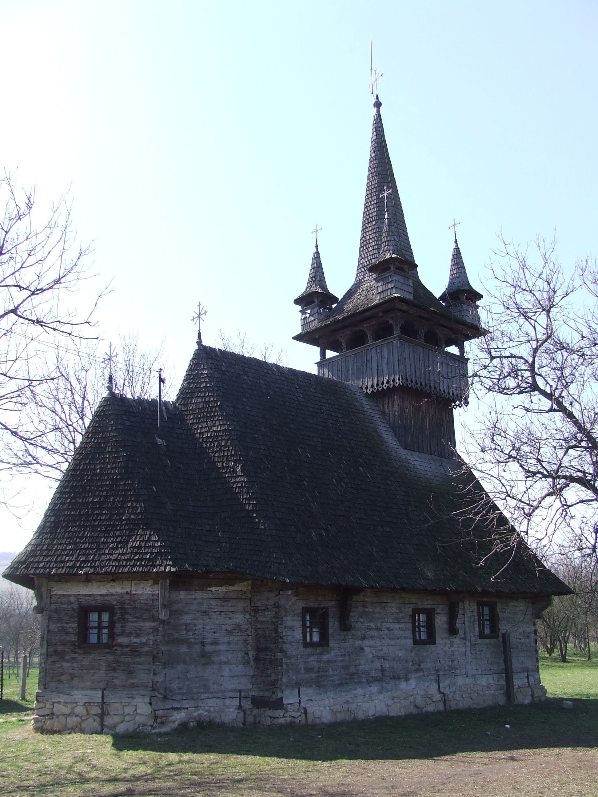 Biserica de lemn din Aghireşu